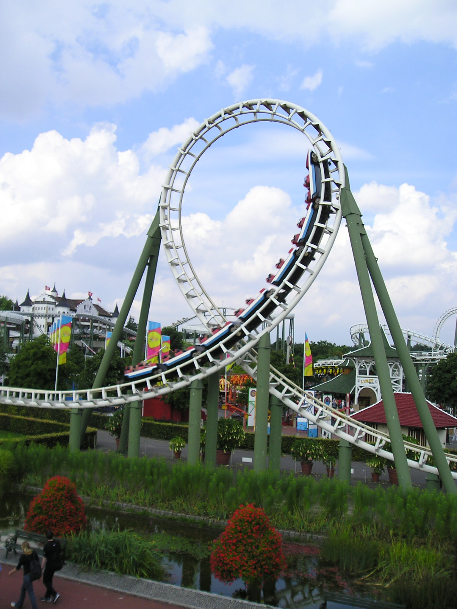 Zug von Big Loop im Loopig, Heide-Park Soltau